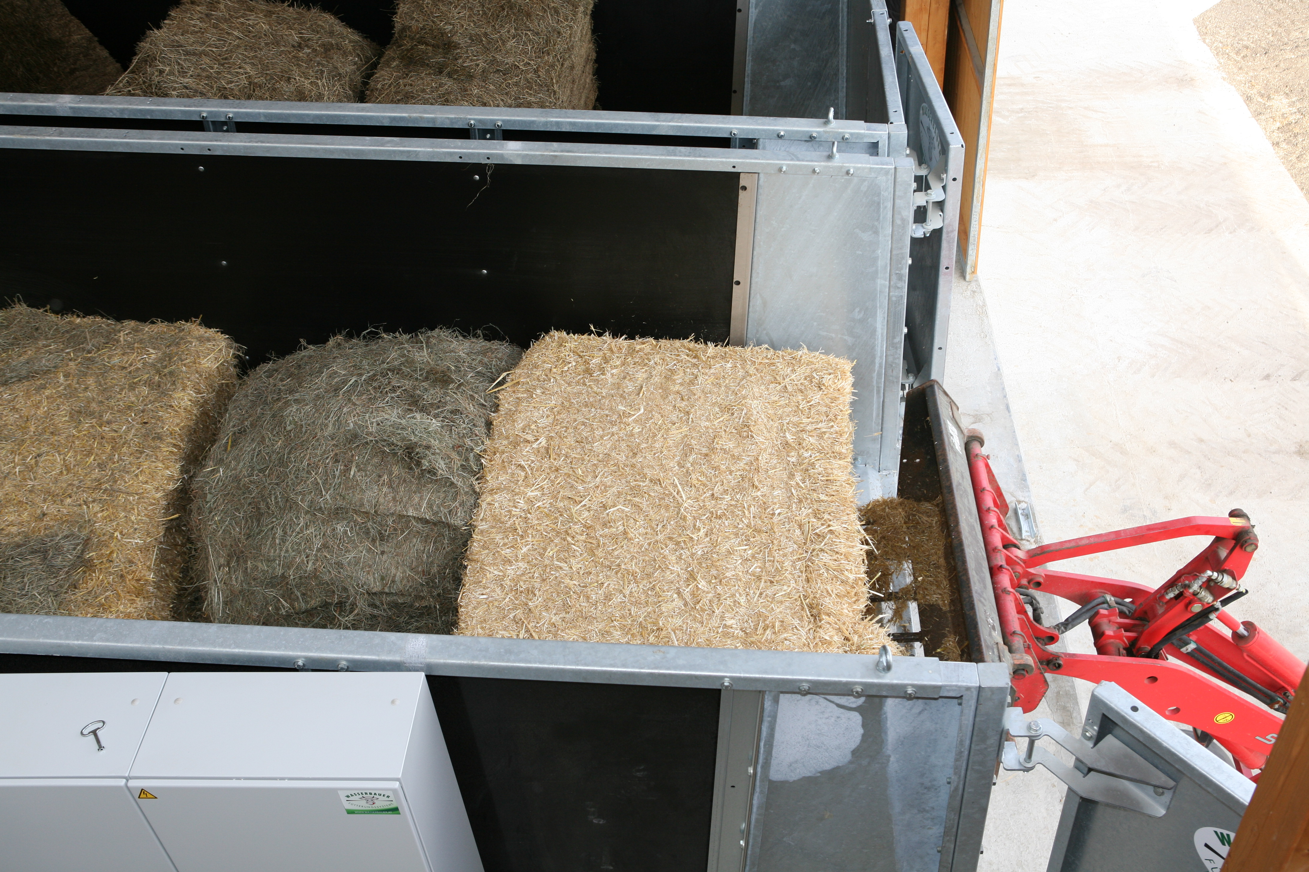 Fa Wasserbauer Frischmixbox